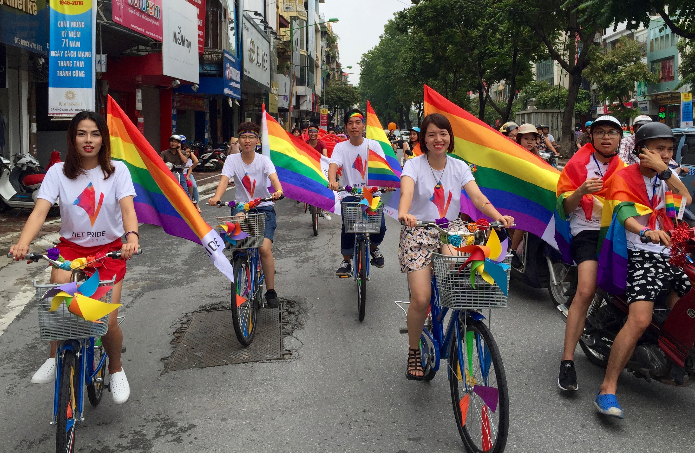 Viet Pride 2016 in Hanoi